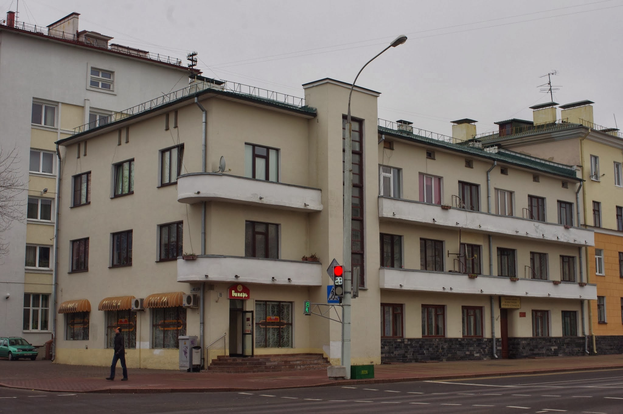 Lieninski rajon, Brest, Belarus